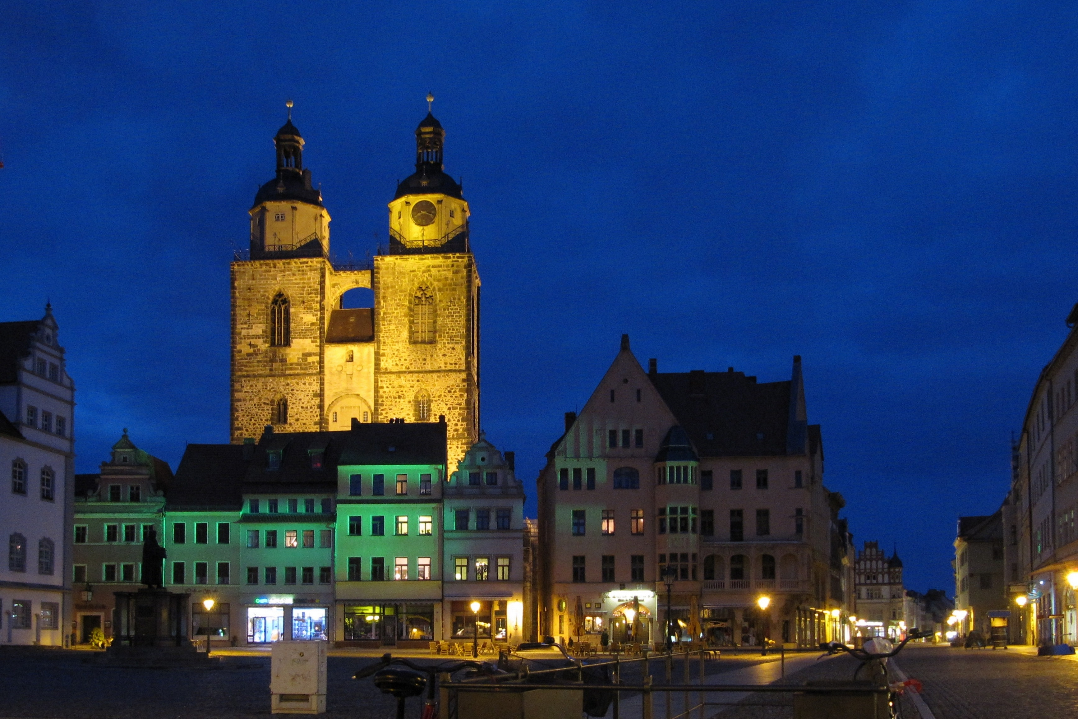 Stadtkirche Lutherstadt Wittenberg bei Nacht, vom Markt aus gesehen